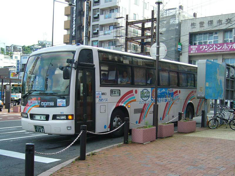 登録番号 佐世保22か11-83 西肥バス所属 さいかい号用 2006年7月28日 佐世保バスセンター附近にて撮影